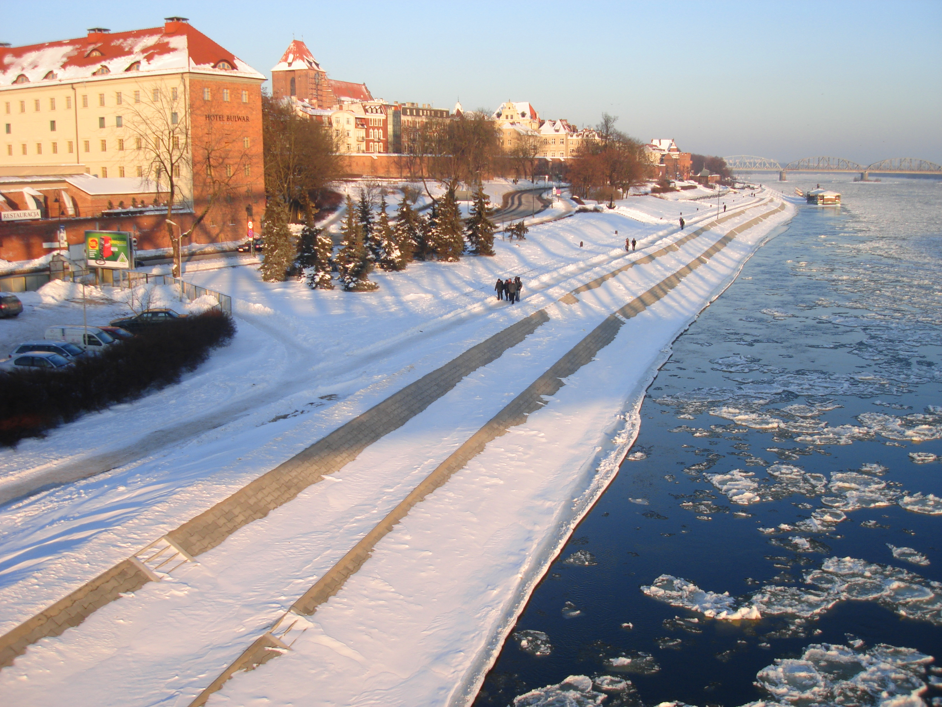 Bulwar Filadelfijski w Toruniu, zima